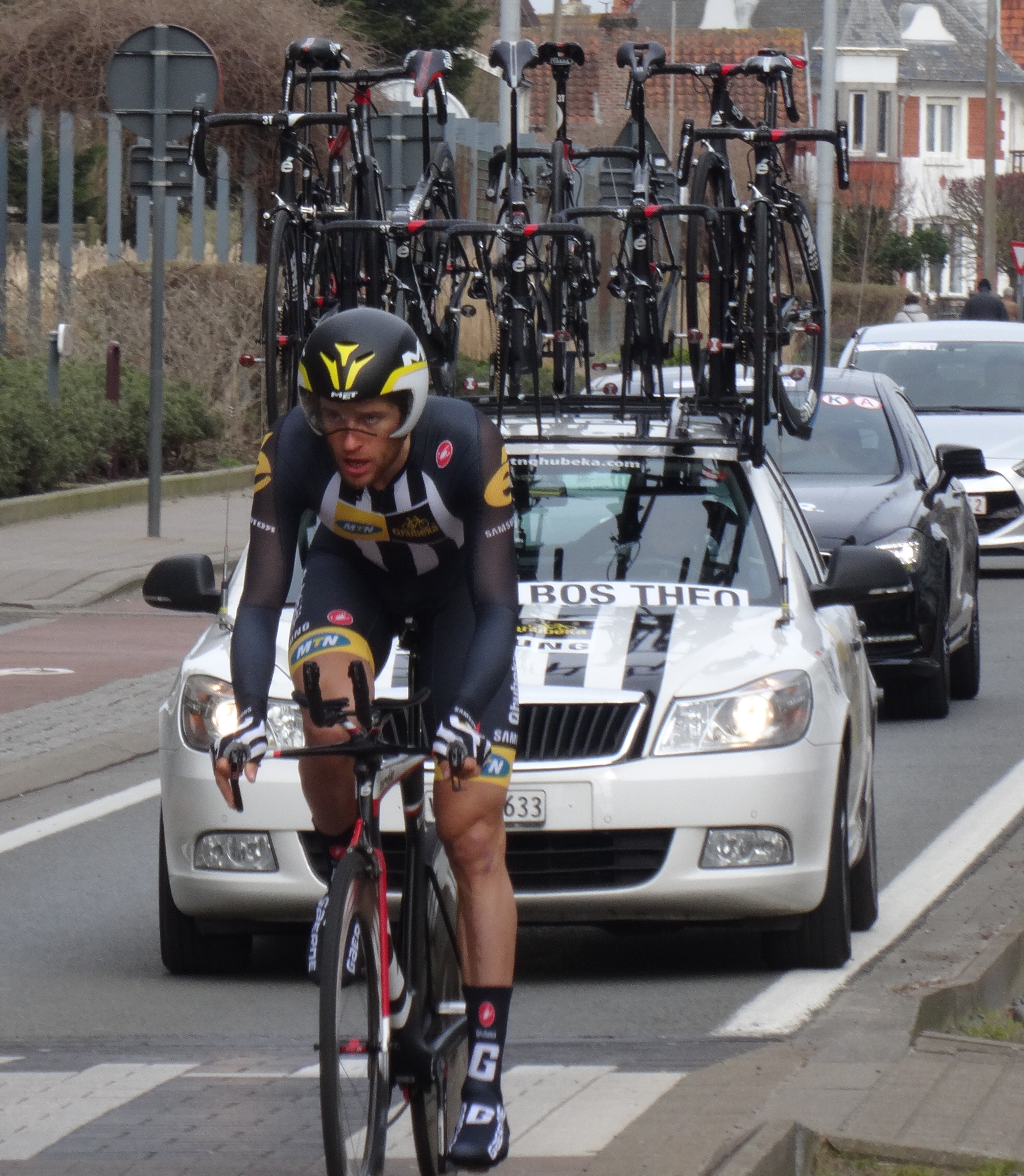 Reportage réalisé le vendredi 6 mars à l'occasion du contre-la-montre individuel du prologue des Trois jours de Flandre-Occidentale 2015 à Middelkerke, Belgique.